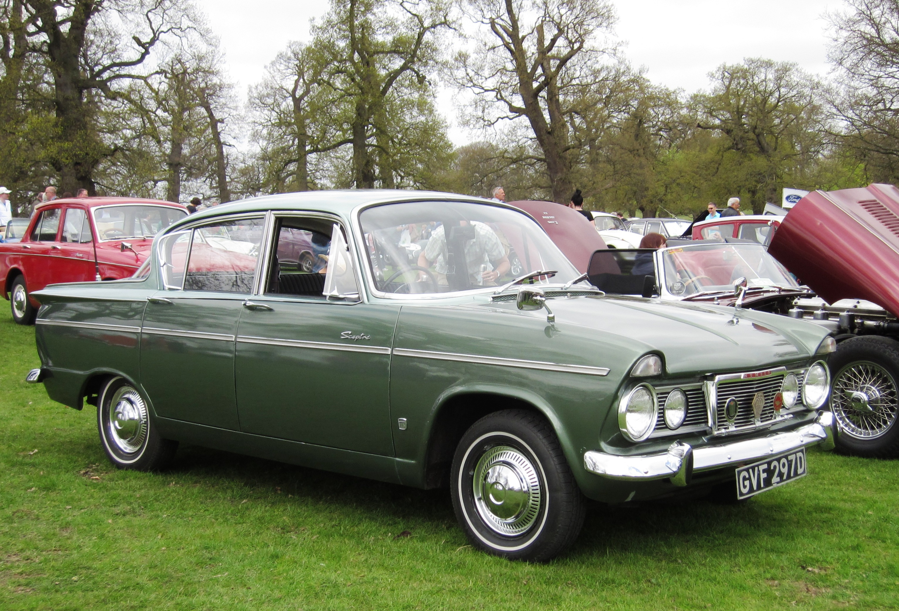 Humber Sceptre II (1966)